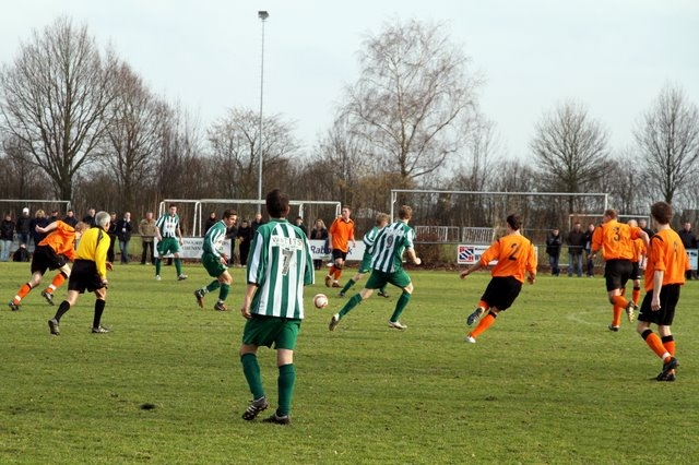 VV Excellent speelt thuis tegen sv DSV.